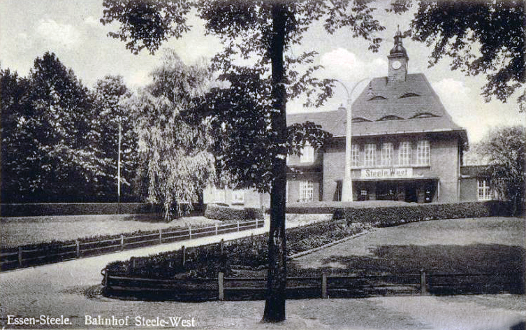 Alter Bahnhof Steele West, heute Essen-Steele